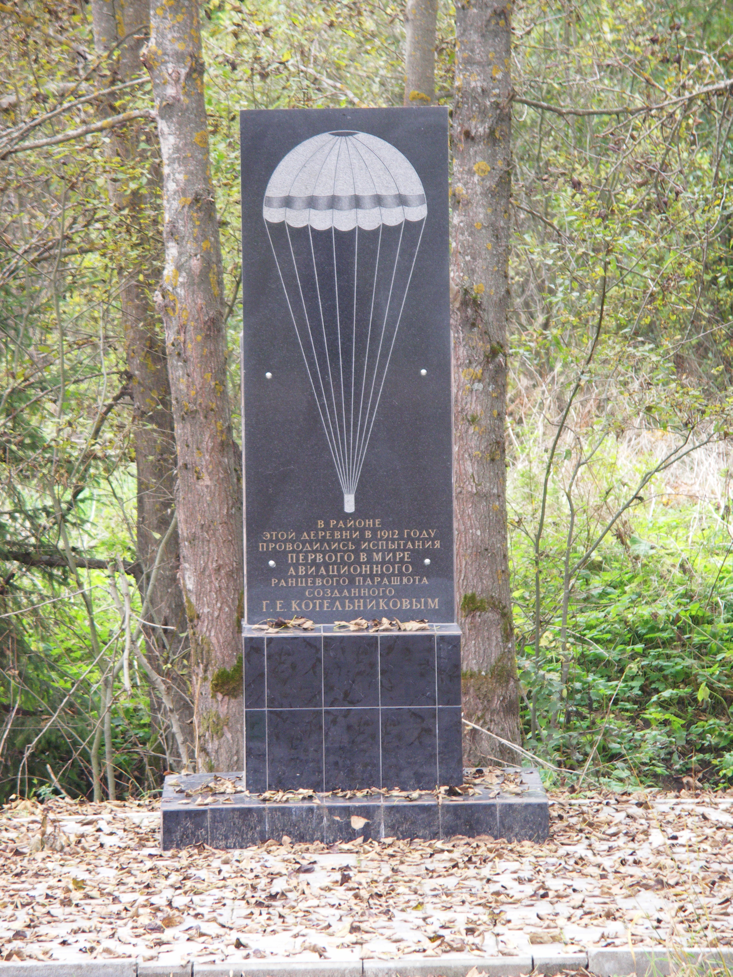 Памятный знак, установленный в деревне Котельниково Гатчинского района Ленинградской области, в память об испытании первого ранцевого парашюта системы Г. Котельникова